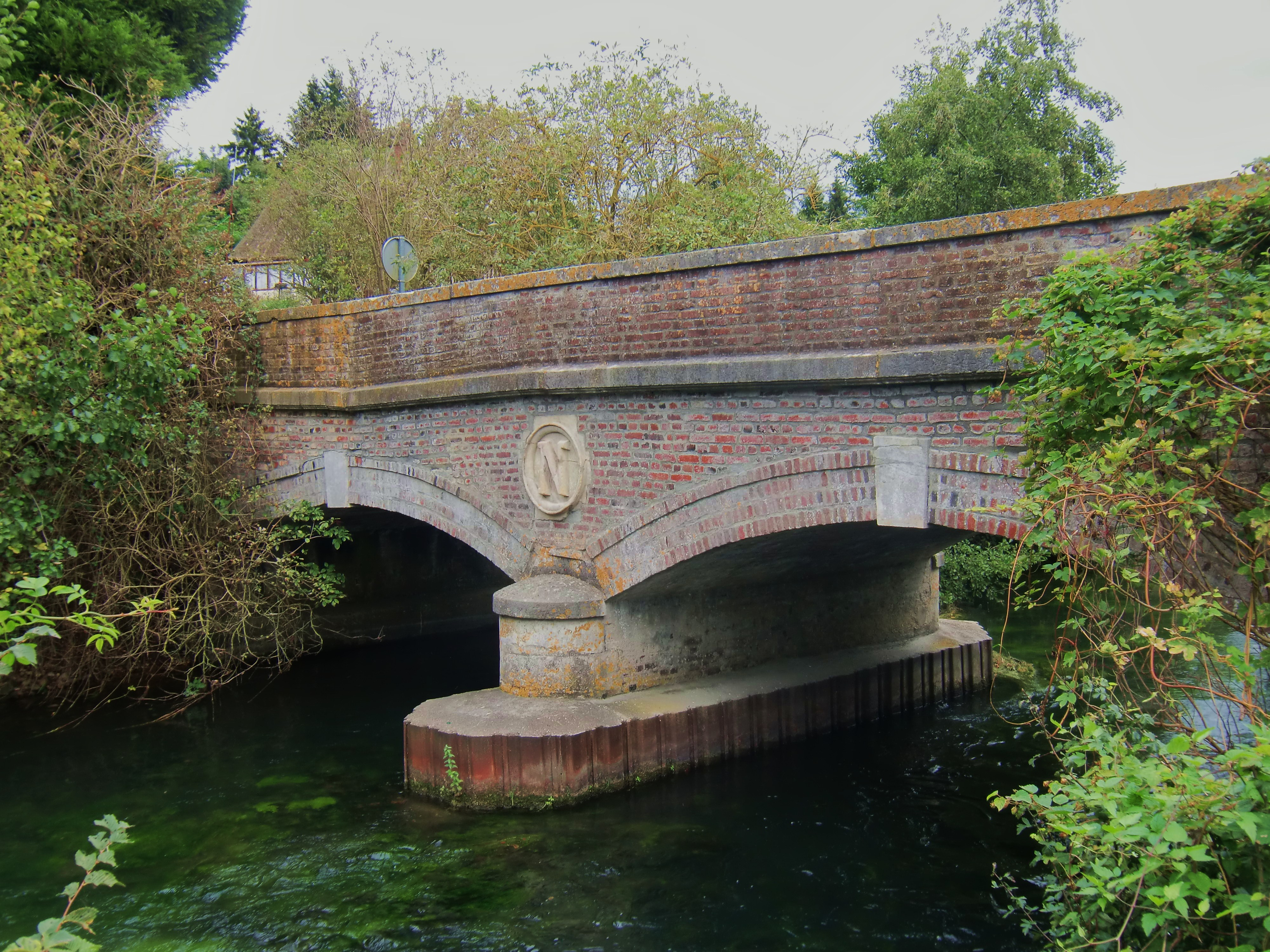 Corneville-sur-Risle (Eure, Normandie, France) : Pont Napoléon, sur le canal des Moulins